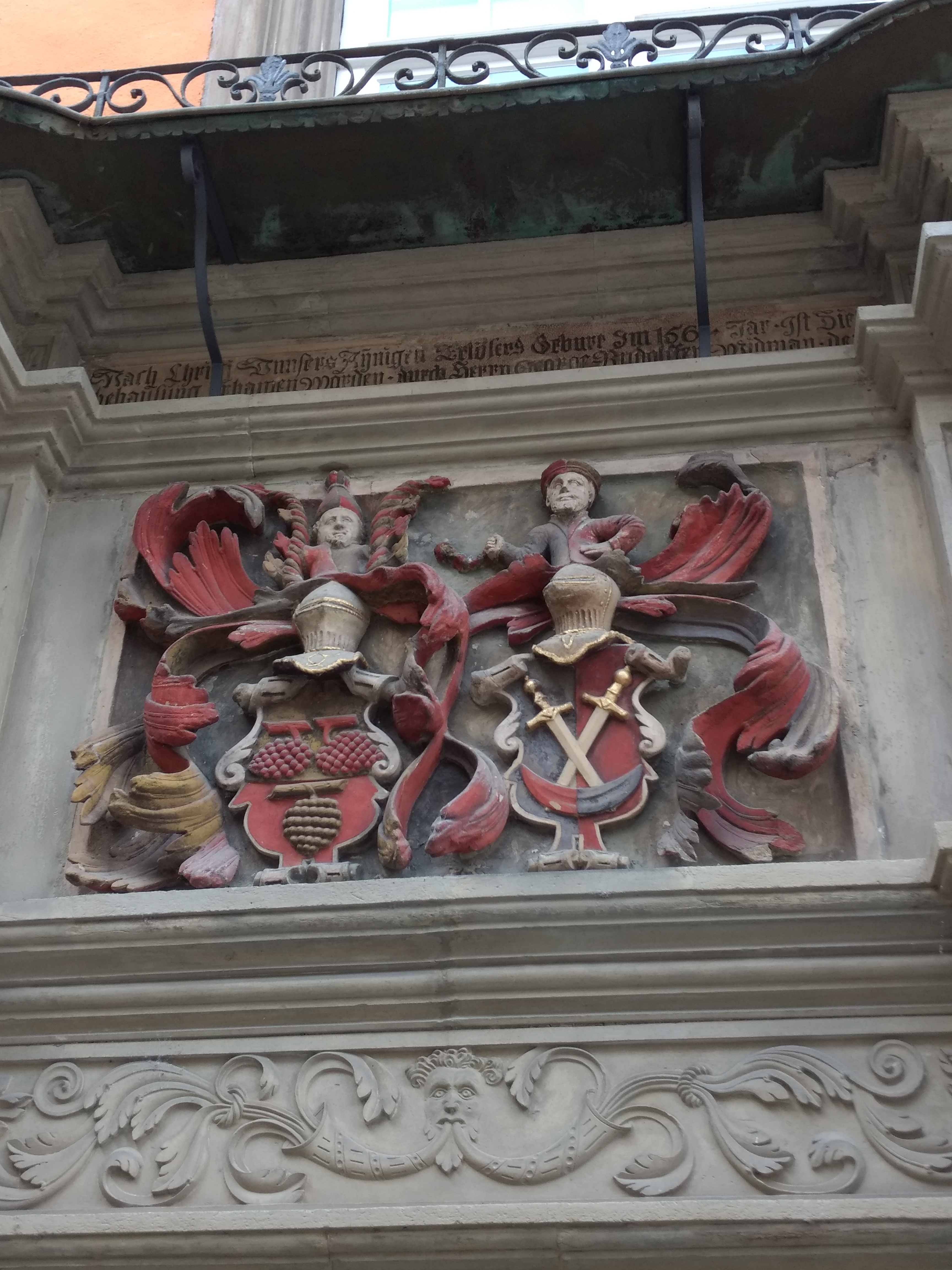 Schwäbisch Hall, rechts Wappenm des Dr. Georg Rudolf Widmann